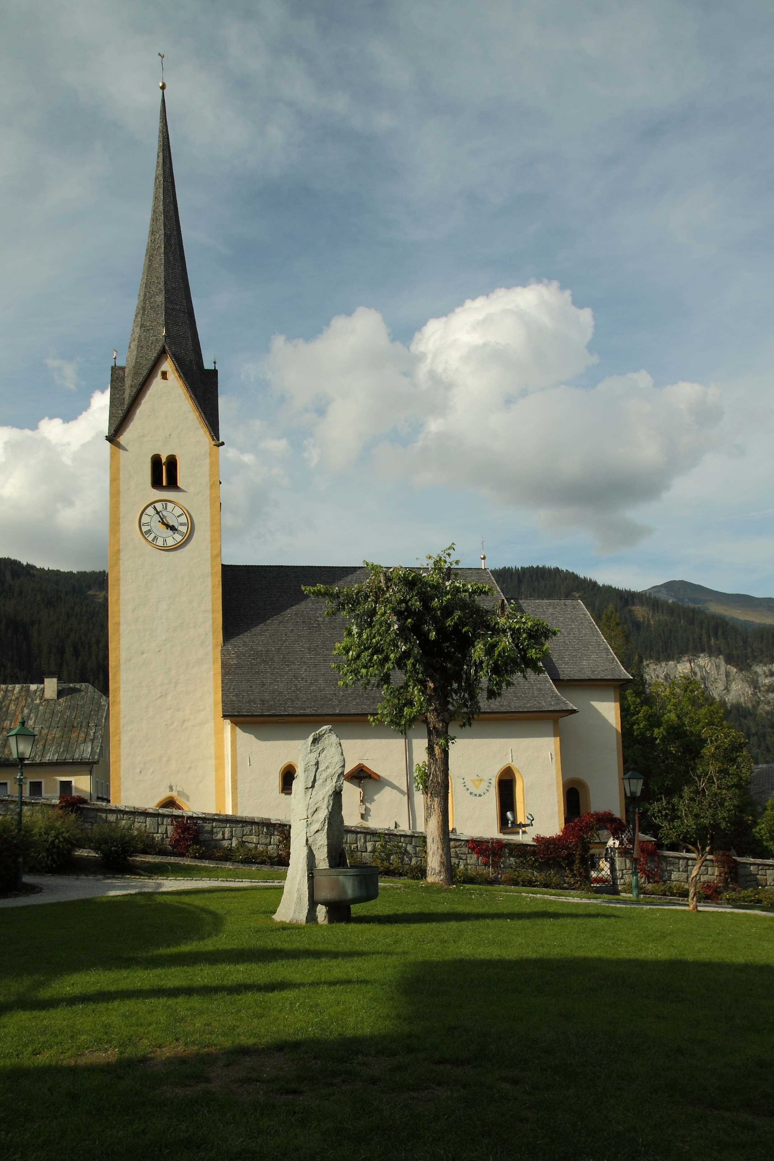 Pfarrkirche Krimml